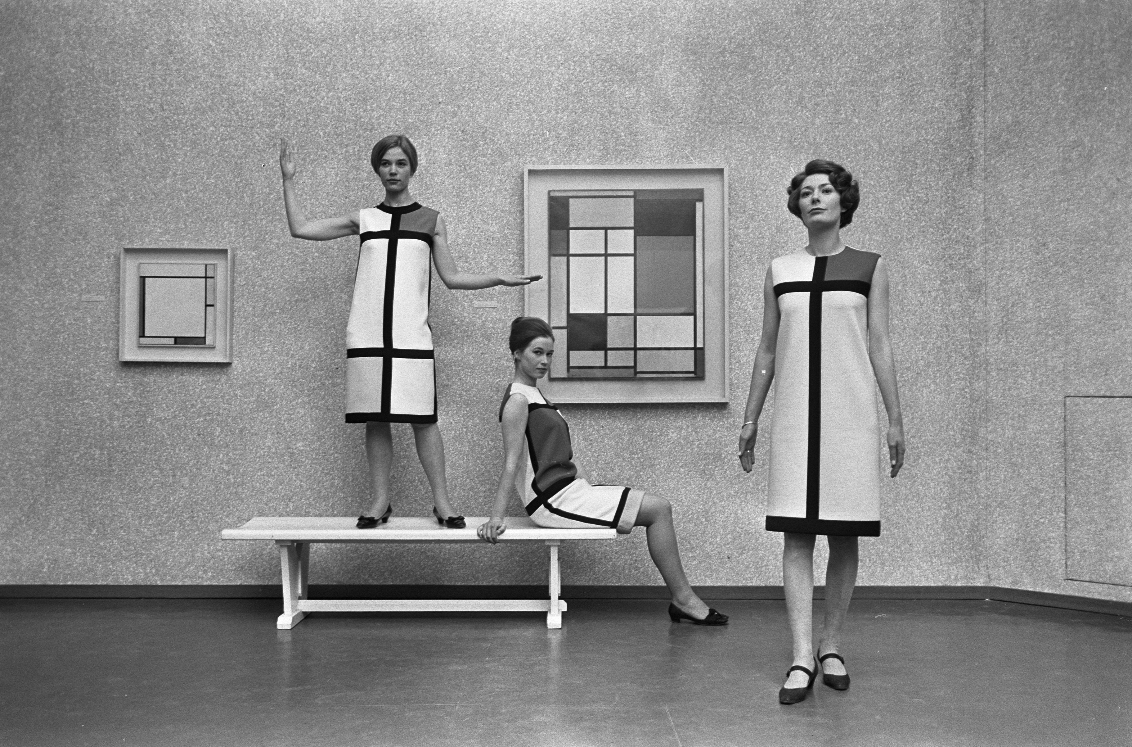 Collectie / Archief : Fotocollectie Anefo Reportage / Serie : [ onbekend ] Beschrijving : Mondriaanmode uit Parijs, japonnen gemaakt door Yves St. Laurent , de modellen in Haagse Gemeente Museum Datum : 12 januari 1966 Locatie : Frankrijk, Parijs Trefwoorden : MODELLEN, musea Fotograaf : Koch, Eric / Anefo Auteursrechthebbende : Nationaal Archief Materiaalsoort : Negatief (zwart/wit) Nummer archiefinventaris : bekijk toegang 2.24.01.05 Bestanddeelnummer : 918-6690